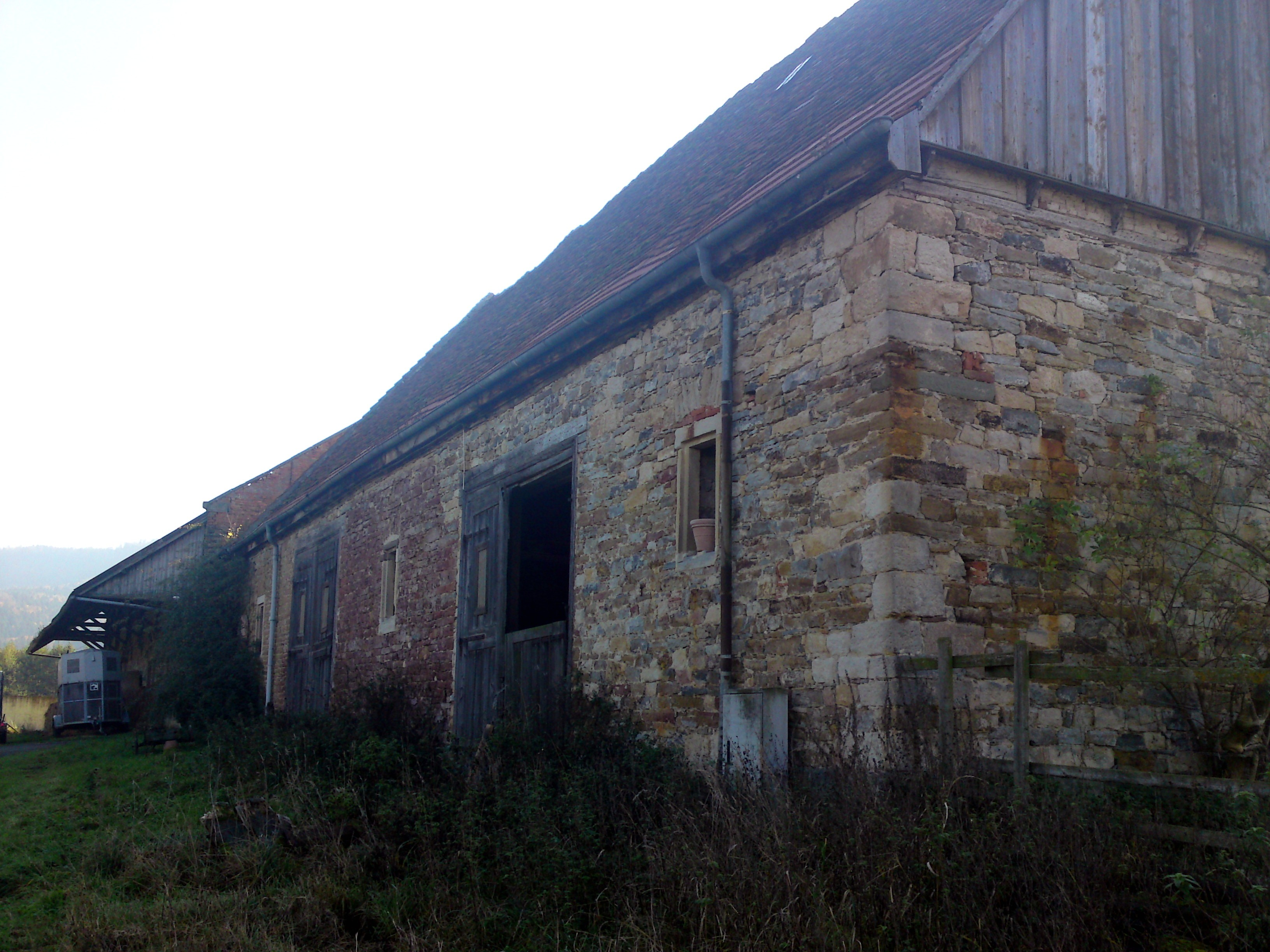 Domänenhof bei Hechingen